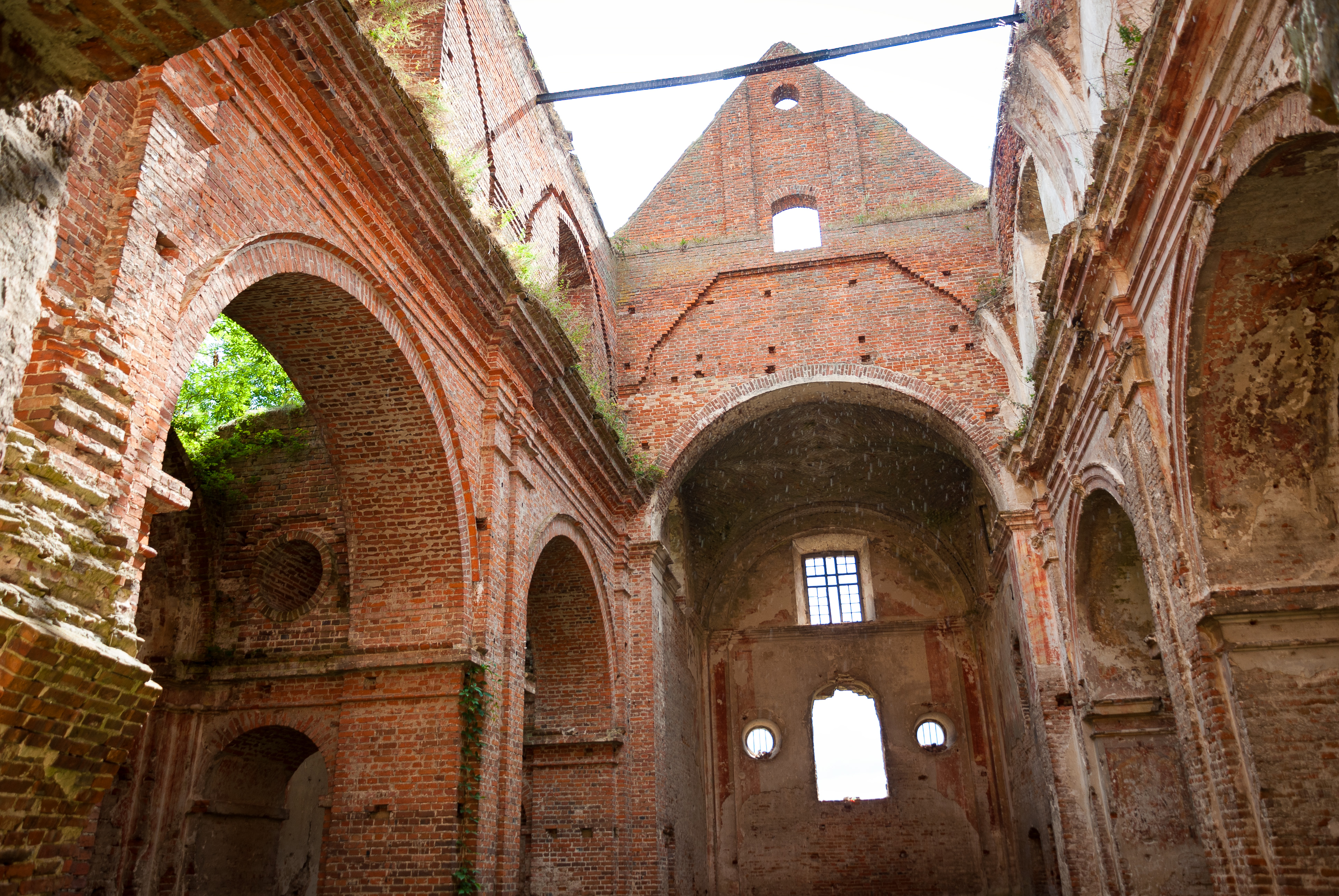 Костел (мур.), Кисилин